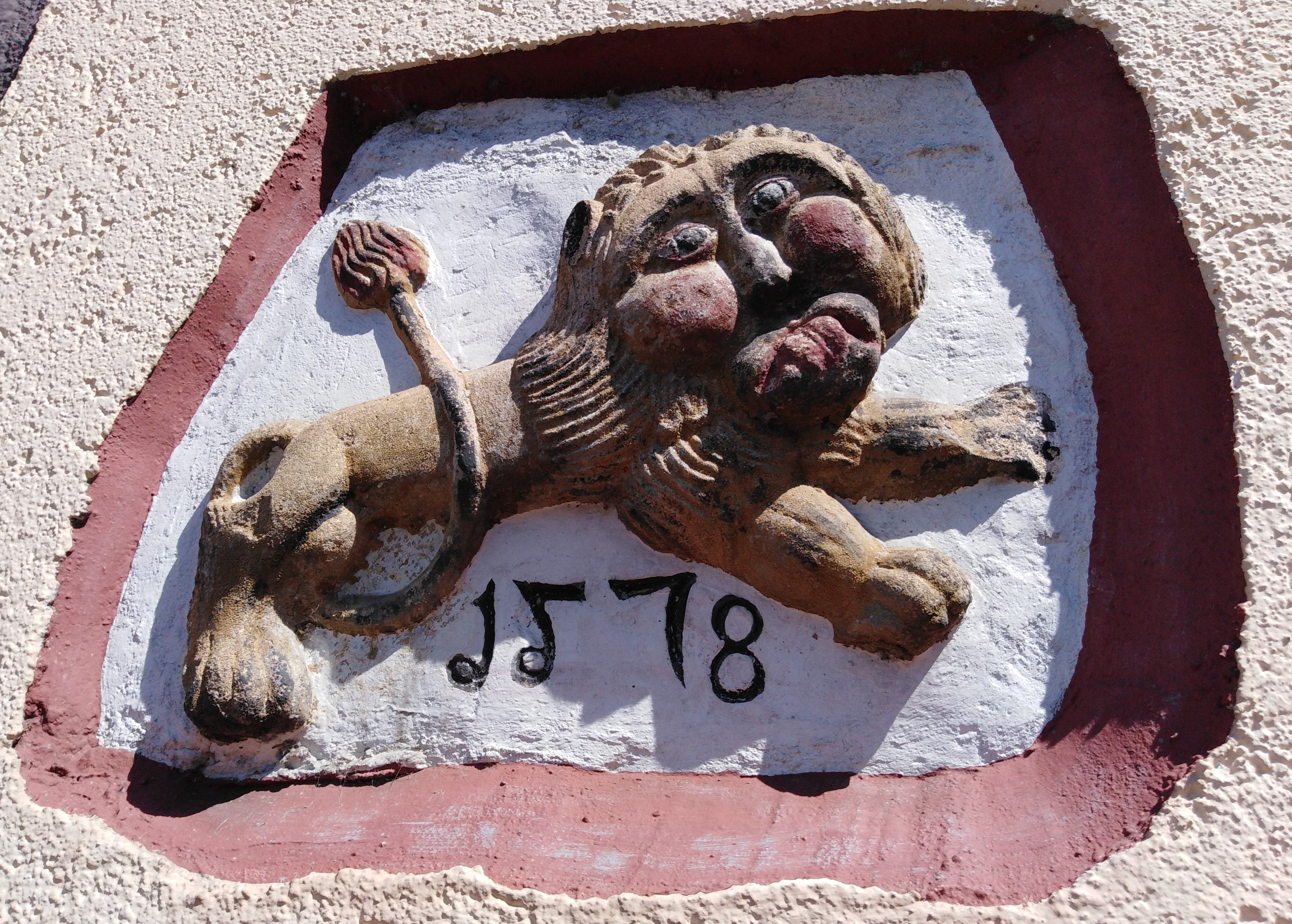 Gasthaus Adler in Lauchringen im Landkreis Waldshut in Baden-Württemberg. Ersterwähnung im Habsburger Urbar 1308. Wappen zum Umbau des damaligen Gasthauseszu Poststation der Österreichischen Reichspost 1578. Die Zuordnung des Löwen als Wappen ist unklar.(Thurn und Taxis führten erst später den Doppellöwen).